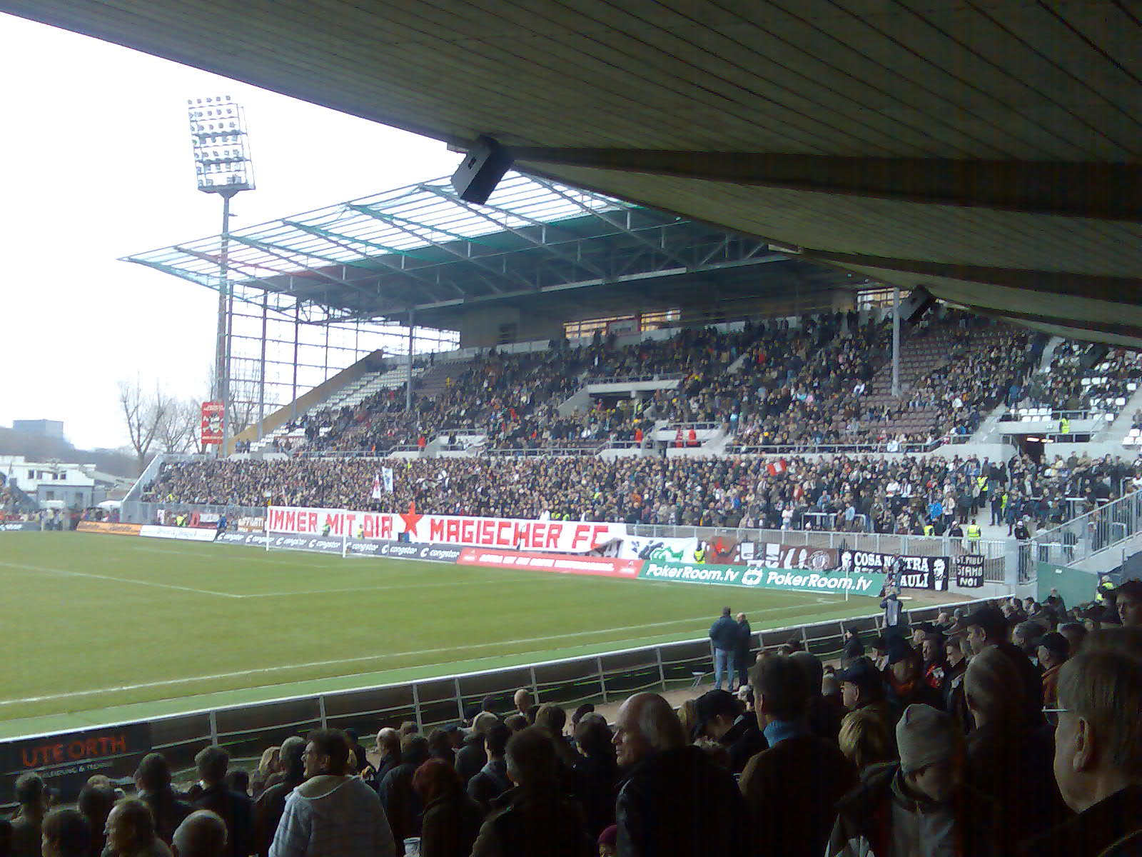 Die neue Südtribüne im Stadion am millerntor